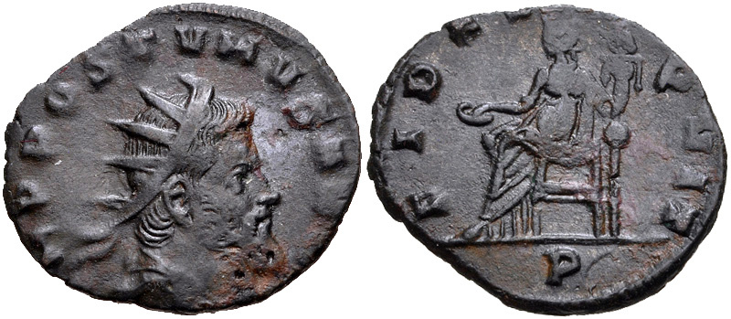 Antoniniano emitido por Auréolo em nome de Póstumo em Mediolano